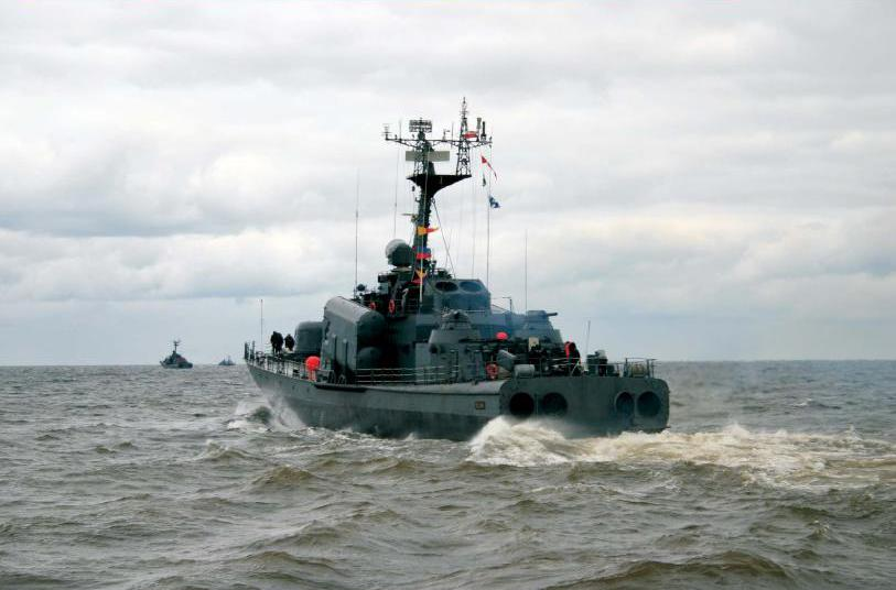 Okręty rakietowe OORP Metalowiec i Rolnik. Zdjęcie pochodzi z Czasopisma Marynarki Wojennej "Bandera", wyd. grudzień 2005. Autor: pan Przemysław Gurgurewicz. Udostępniono za zgodą Sekretarza Redakcji Czasopism Marynarki Wojennej - Redaktora Naczelnego Czasopisma Marynarki Wojennej "Bandera" kmdra ppor. Mariusza Konarskiego. Zgodę uzyskał Joymaster. kkic dyskusja 16:43, 25 lis 2005 (CET)